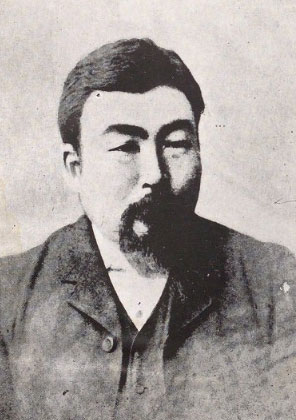 荒尾精の肖像写真